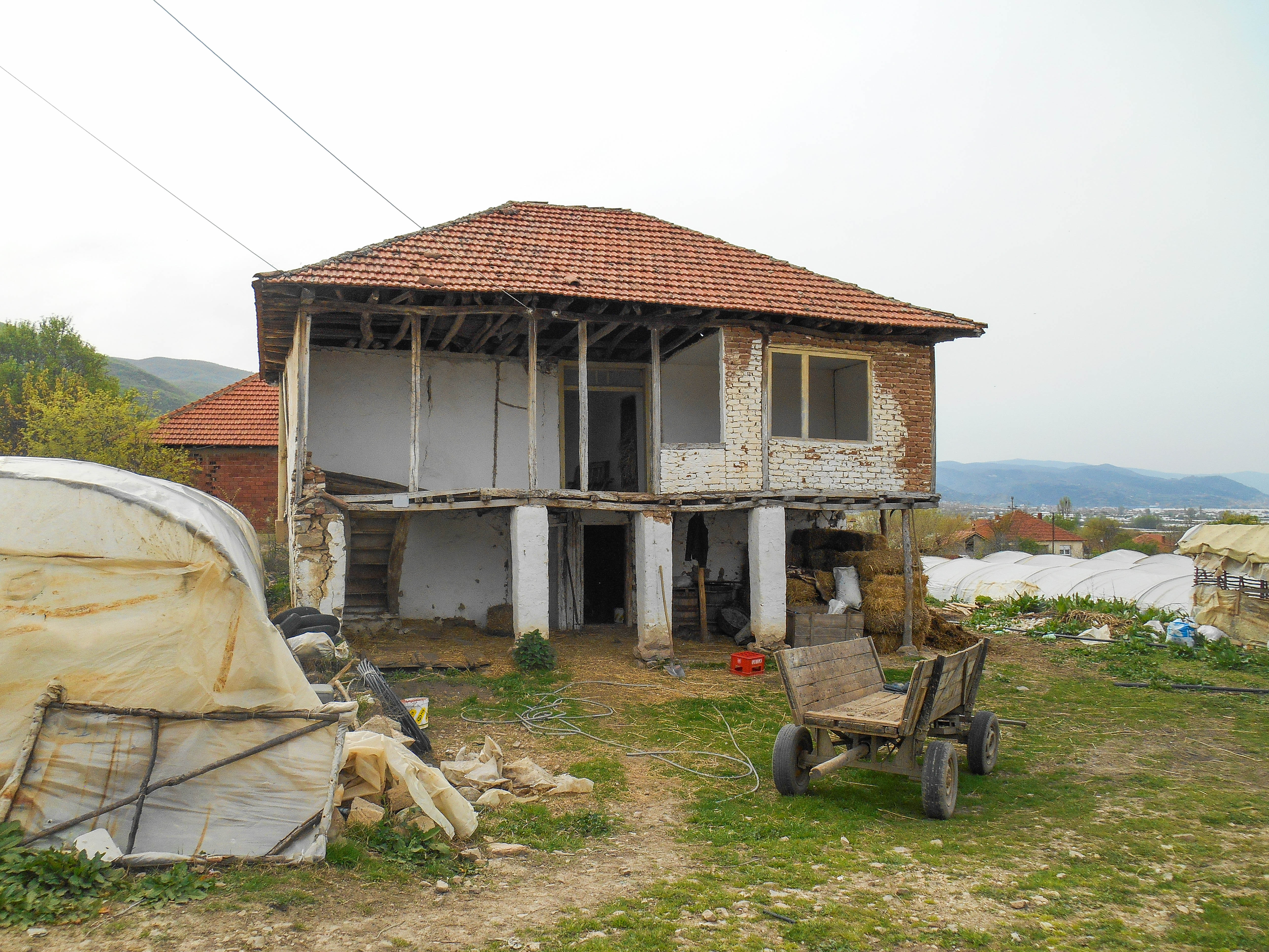 Стара куќа во селото